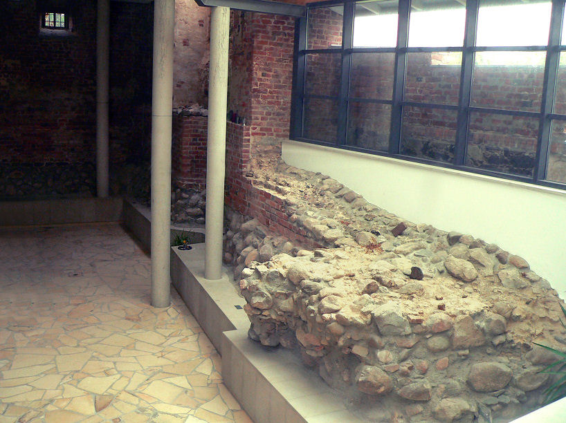 Fundamente Burg Rethem